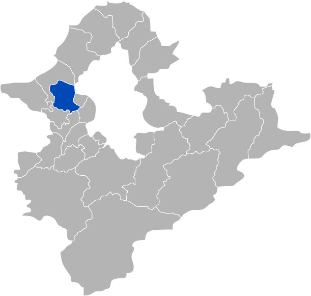 KaurJmeb為編寫臺灣省臺北縣五股鄉，於2005年1月所繪製。